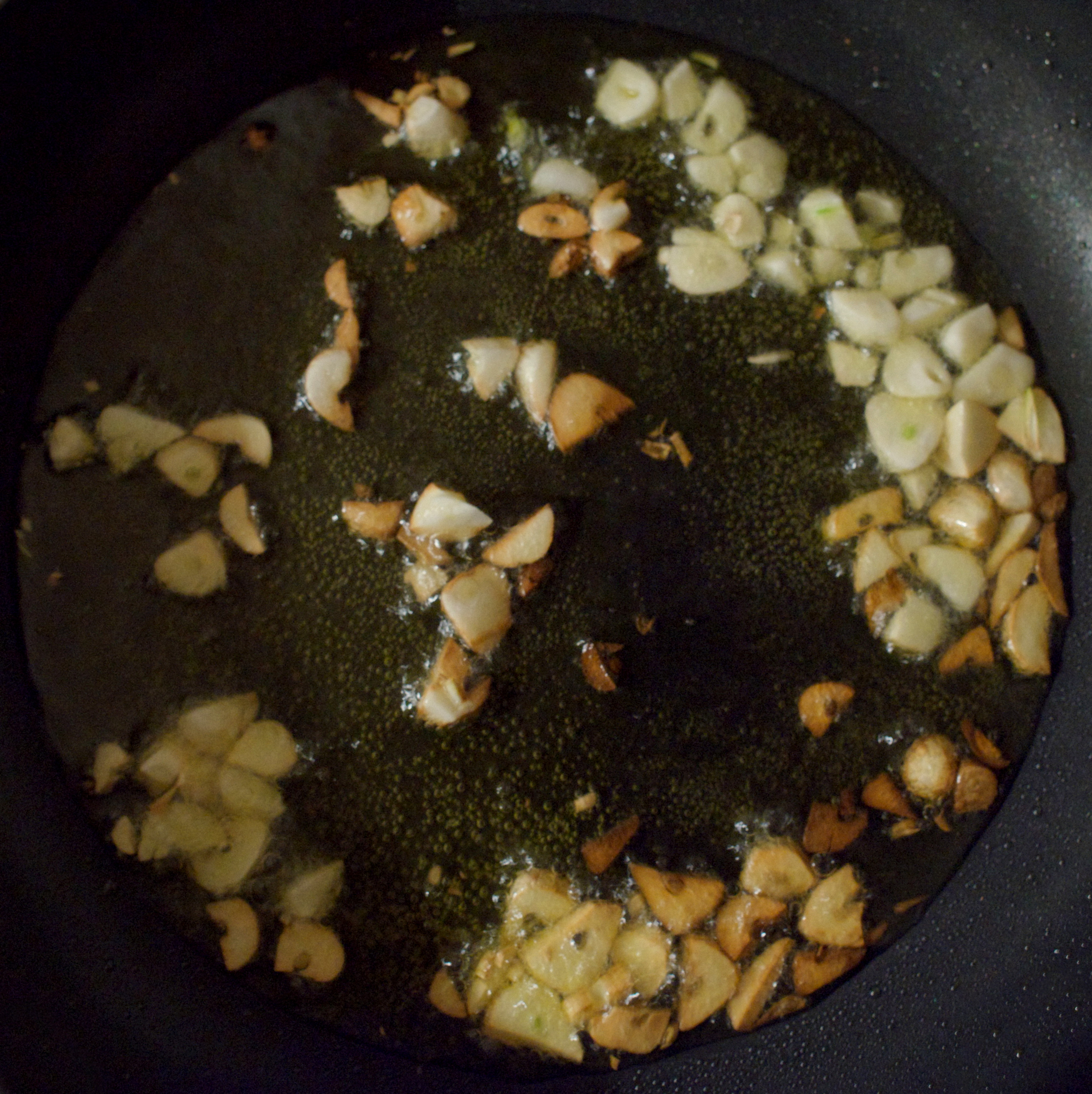 Valkosipuli on niin voimakasmakuinen, että esimerkiksi öljyssä kuullotettuna se sopii vaikkapa pastakastikkeen ainoaksi aineosaksi.